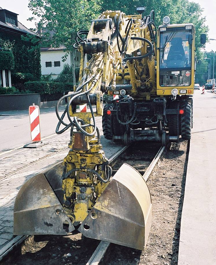 Ein Zweiwegebagger auf Baustelle (Umbau der Straßenbahn-Haltestelle Am Aubuckel in Mannheim-Feudenheim)